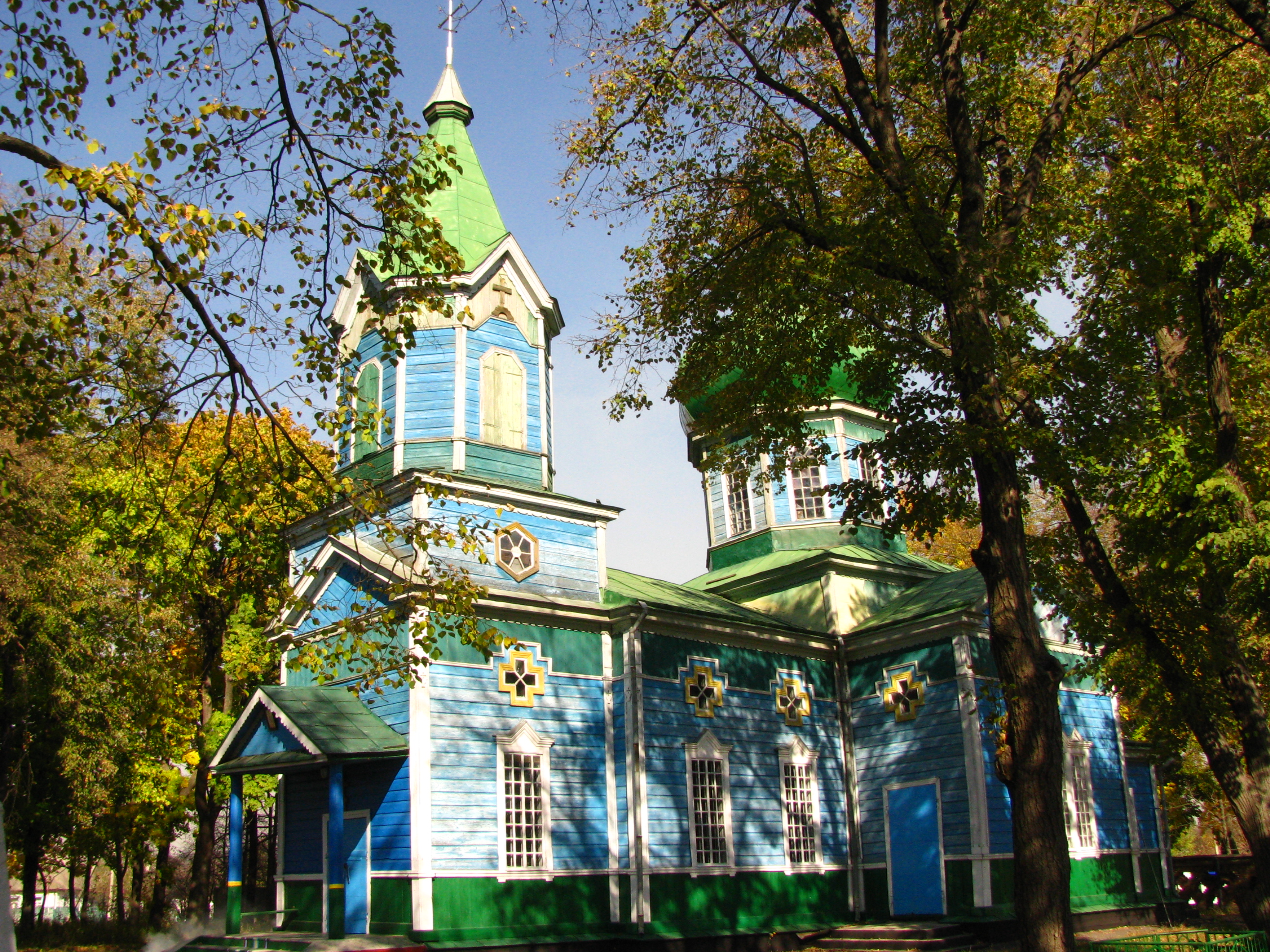 Церква Св. Дмитра (мур.) (дер.), с. Тернівка, діюча.